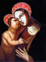 Изображение чудотворного образа Богоматери Кальварийской (Польша) без оклада. Неизвестный автор. Время обретения - 1641 год.